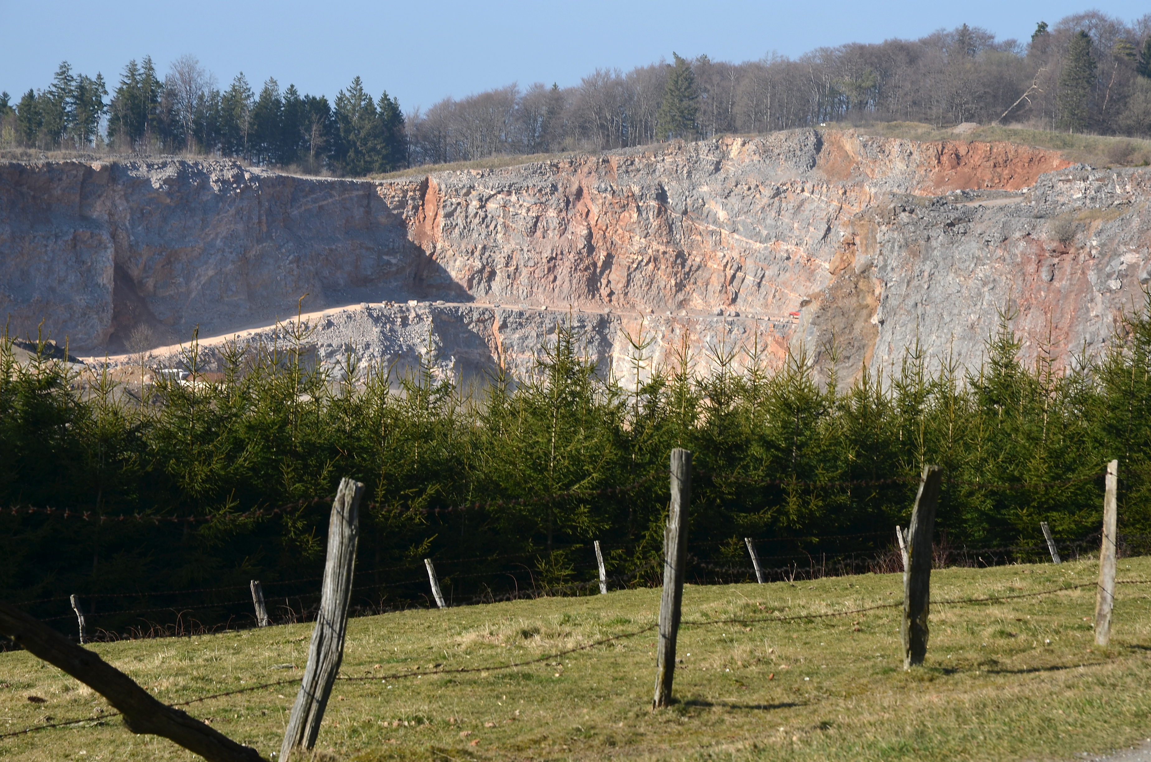 Abbau von grauem bis hellgrauem dickbankingen Devonischen Massenkalk.